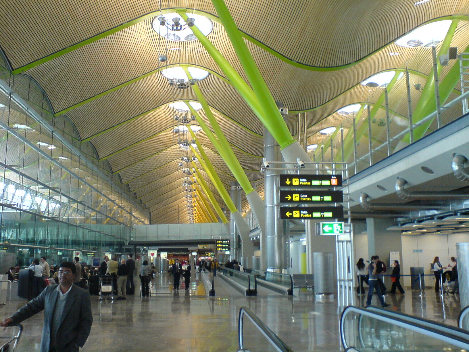 Imagen tomada en la terminal 4 del Aeropuerto de Madrid-Barajas / Image taken at Terminal 4 of Madrid-Barajas Airport